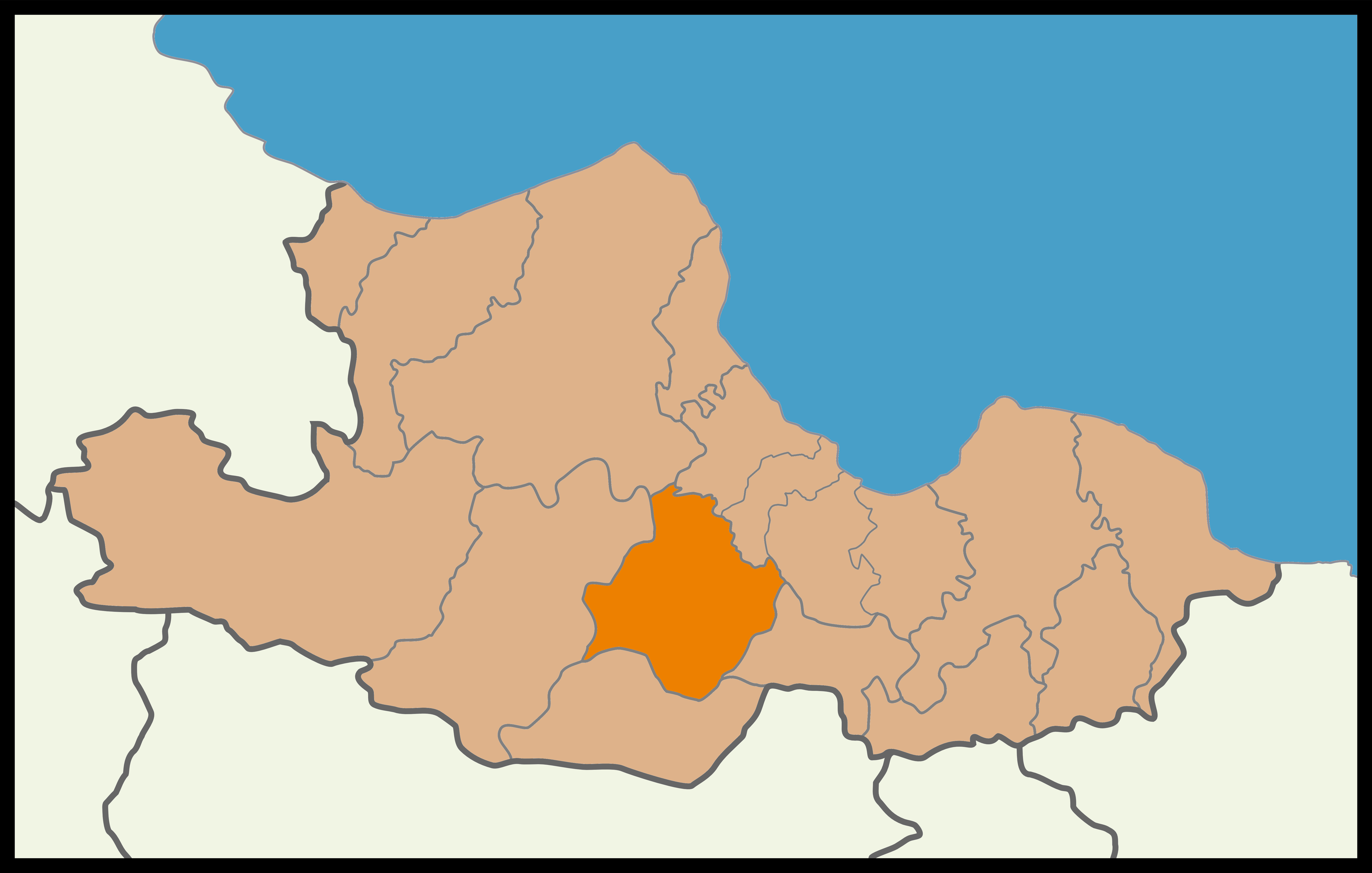 Samsun'un Kavak ilçesinin 2015 Türkiye genel seçimleri haritası.